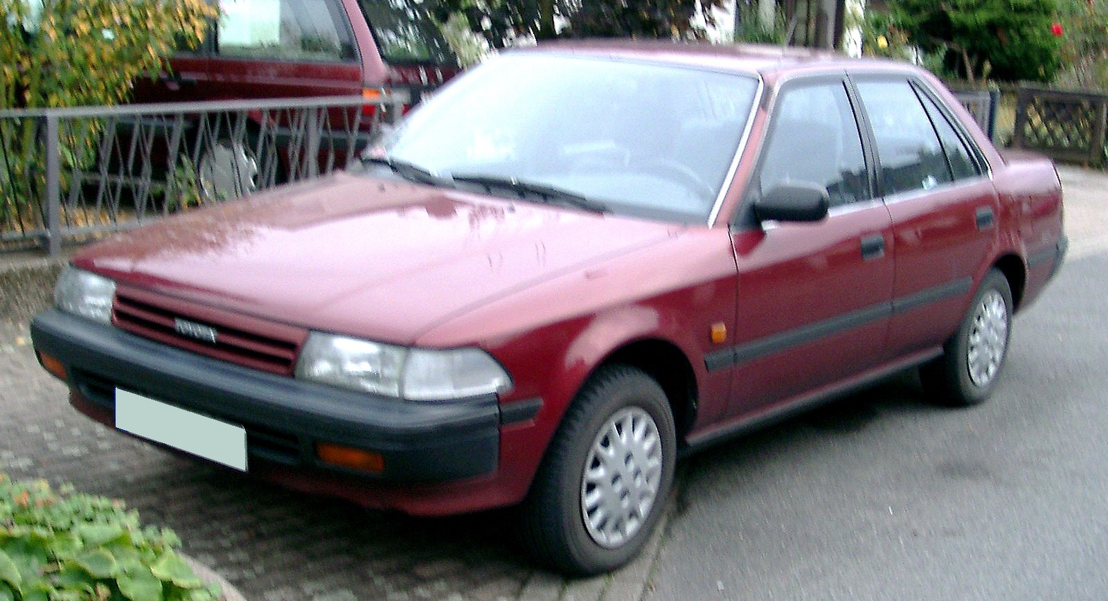 Toyota Carina II